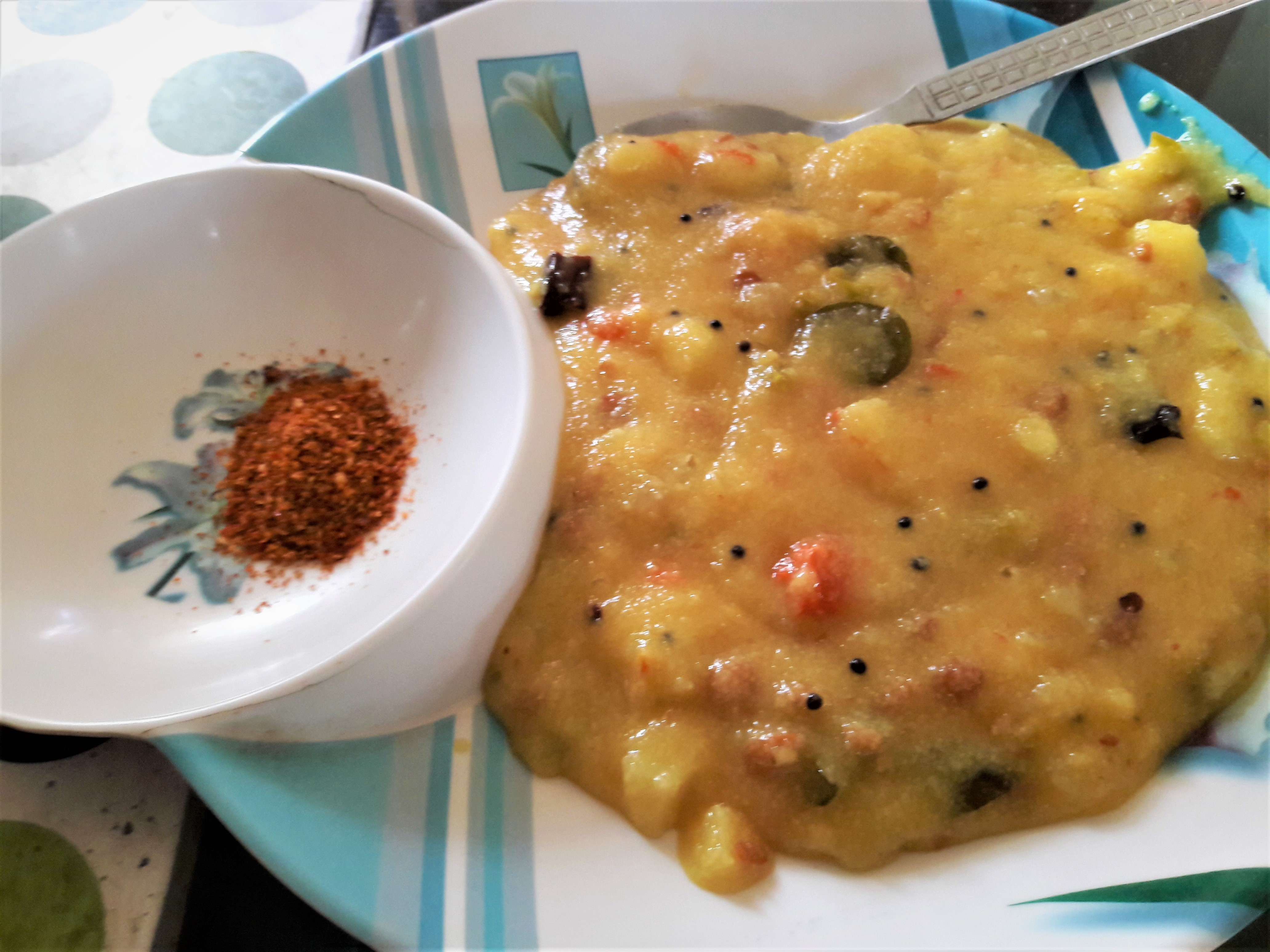 టమాట బాత్